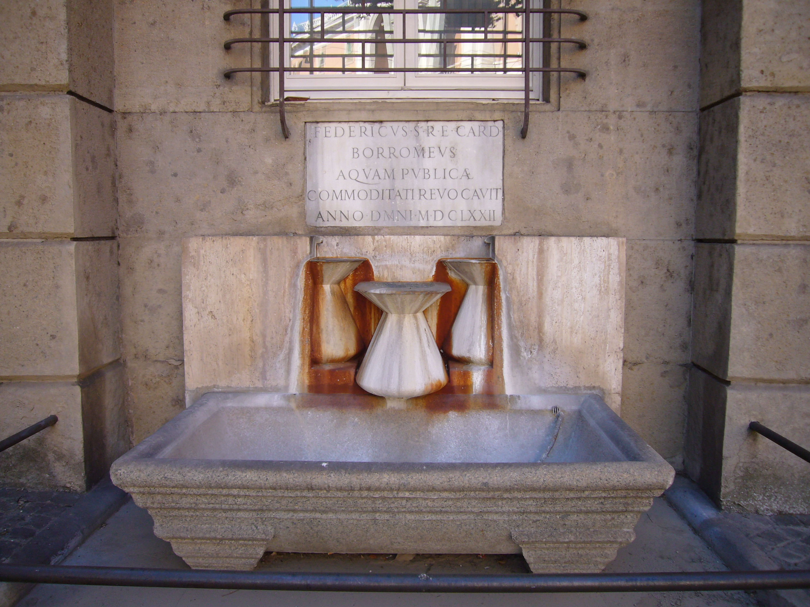 Roma, via Flaminia: l'odierna fontana delle conche (già "beveratore" di Giulio III)